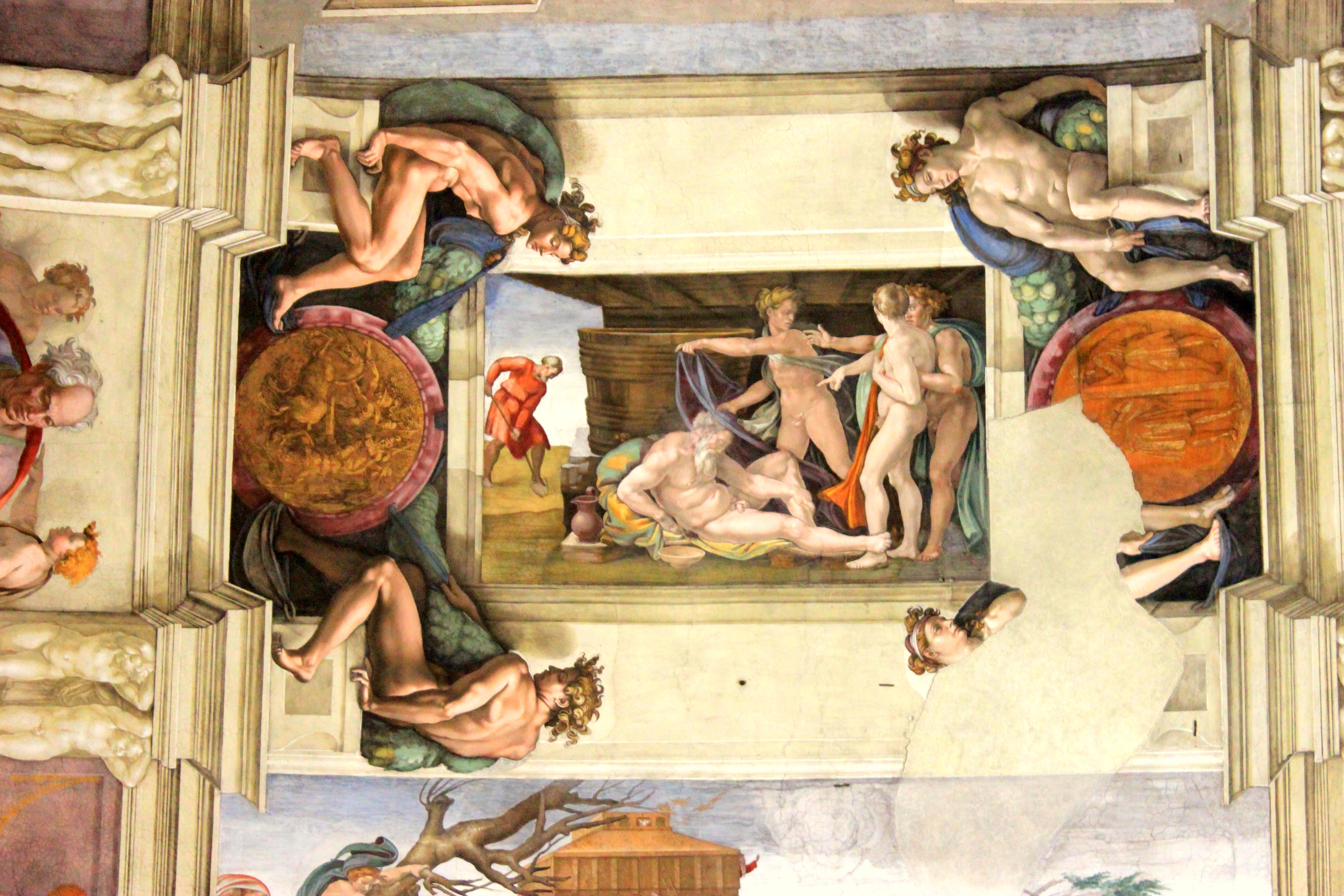 La Embriaguez de Noé